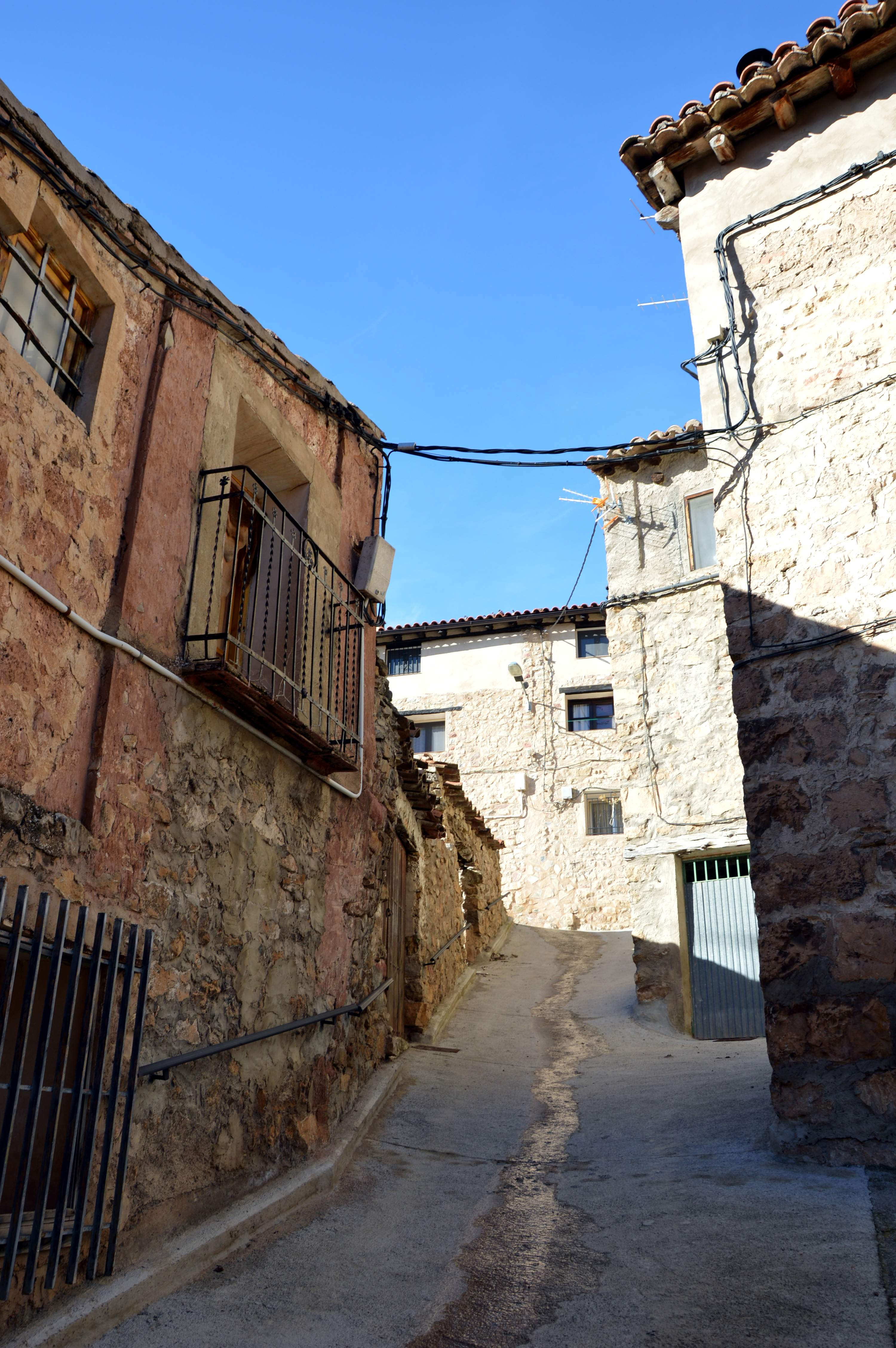 Vista parcial de la calle del Horno en Tormón (Teruel), 2017.